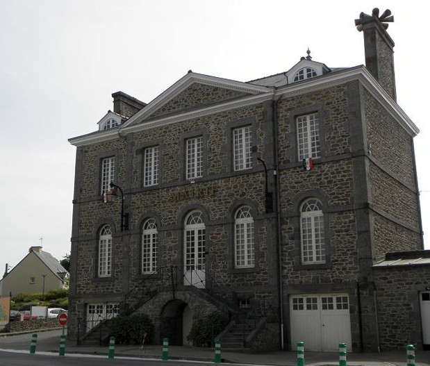 Mairie de Plerguer (35).